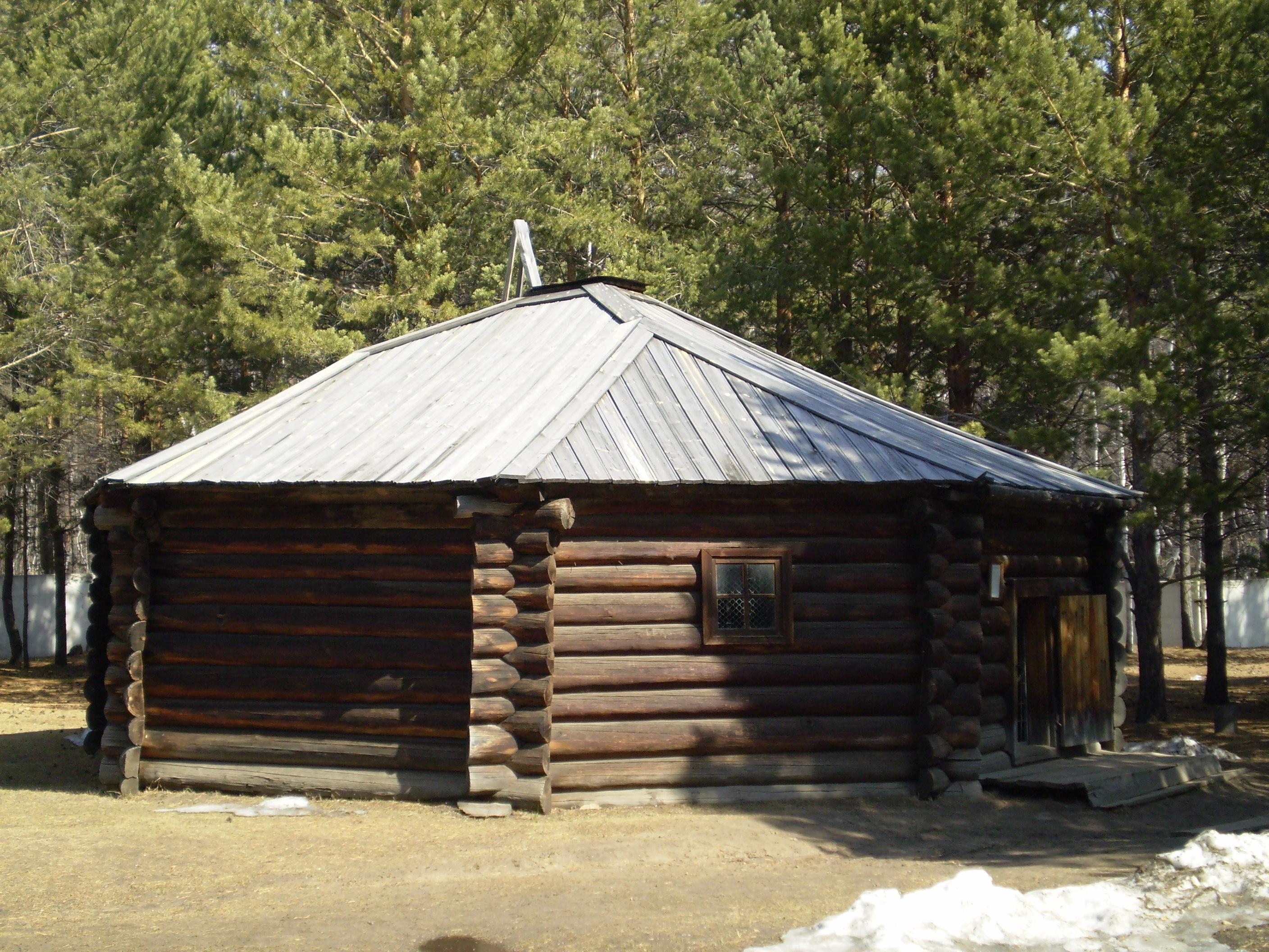 Восьмистенная летняя юрта. 1910 год. Качутский район Иркутской области